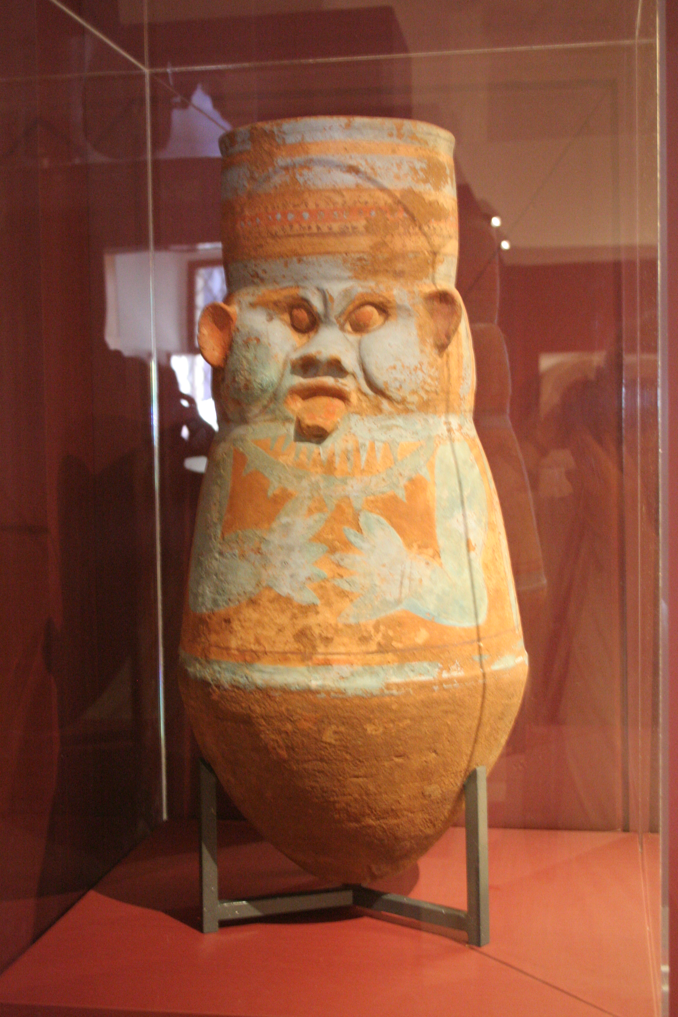 Bes-Gefäß, Neues Reich